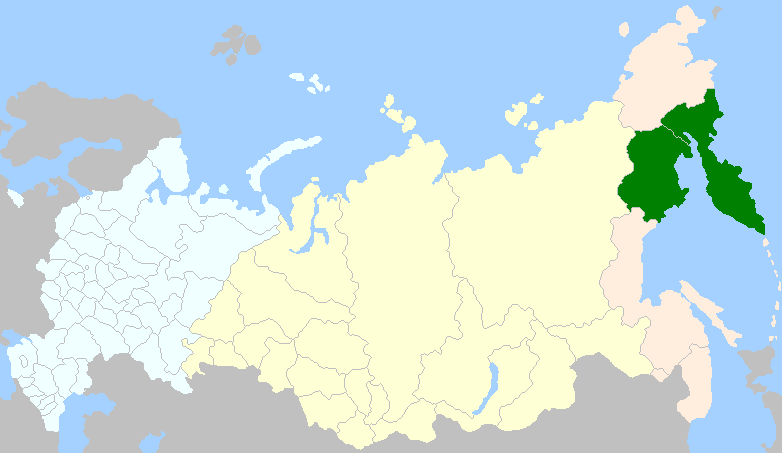 régions administratives occupées en 2008 par les Itelmenes